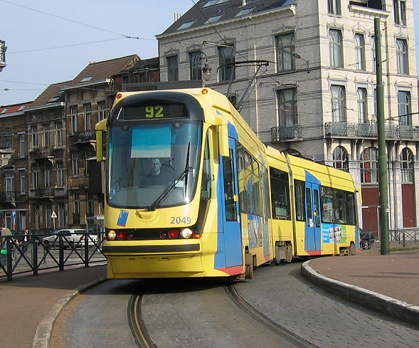 Een tram op de Brusselse tramlijn 92.